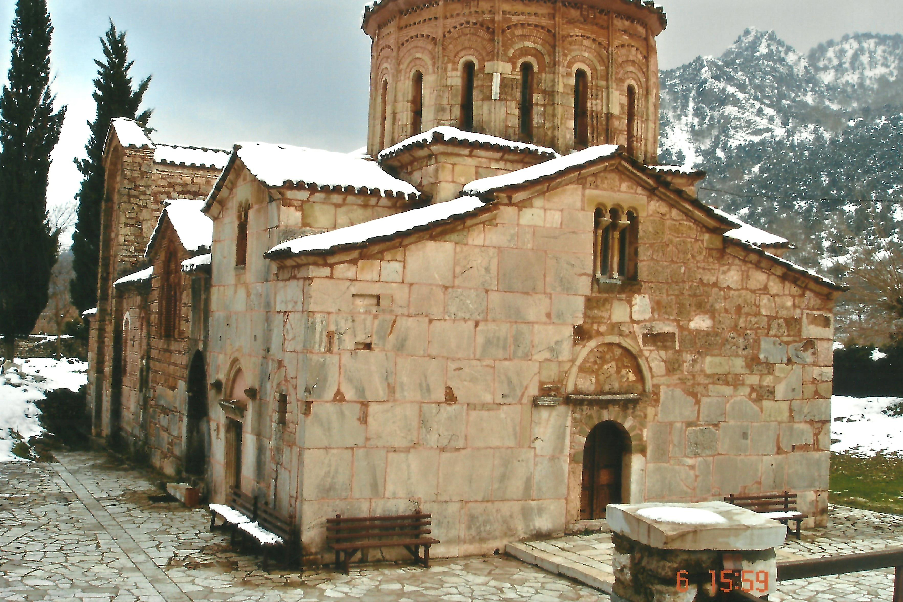 Ναός Πόρτας Παναγιάς Πύλης«Ναός Πόρτας Παναγιάς Πύλης»